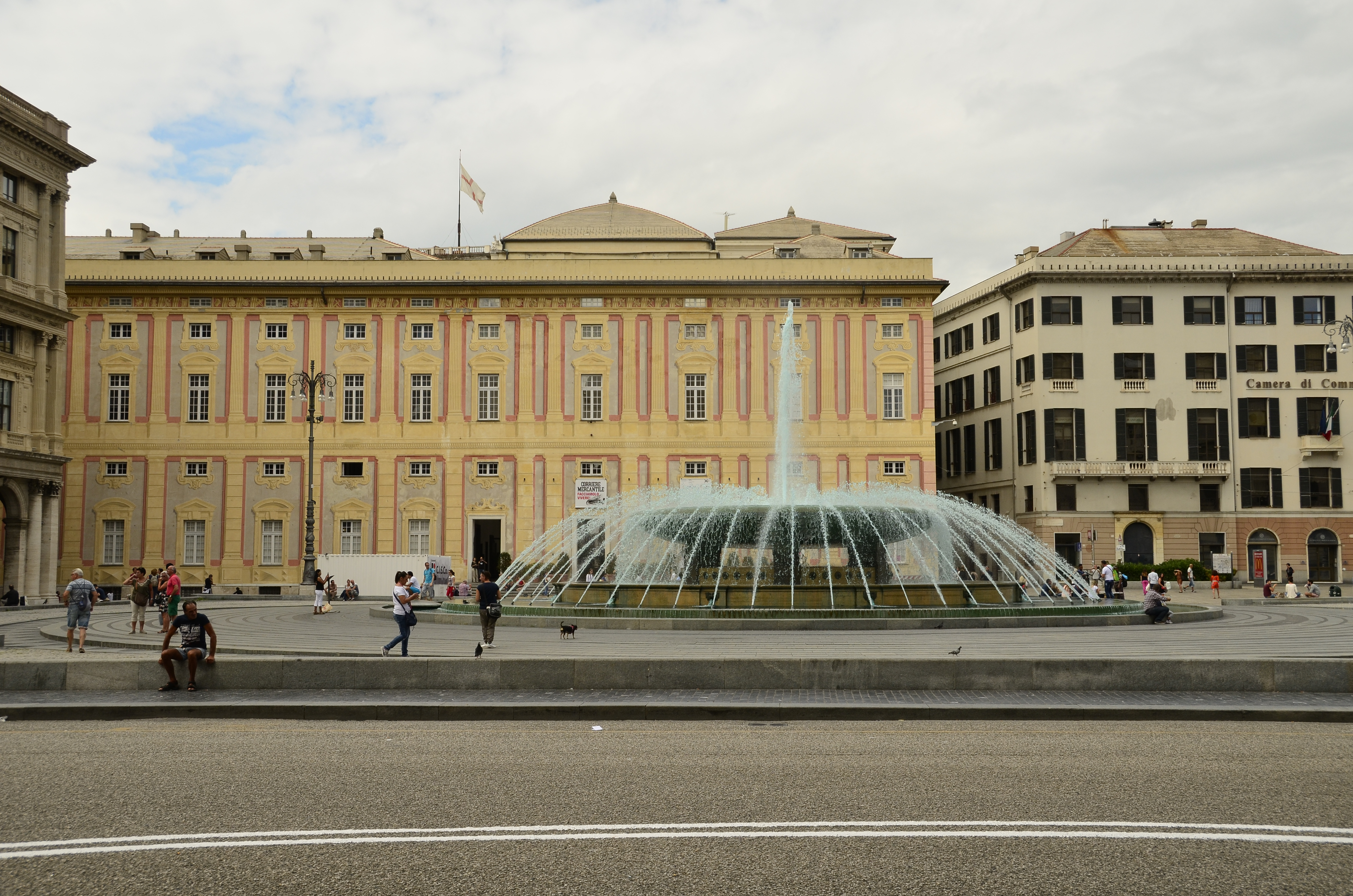 Palazzo Ducale di Genova This is a photo of a monument which is part of cultural heritage of Italy.